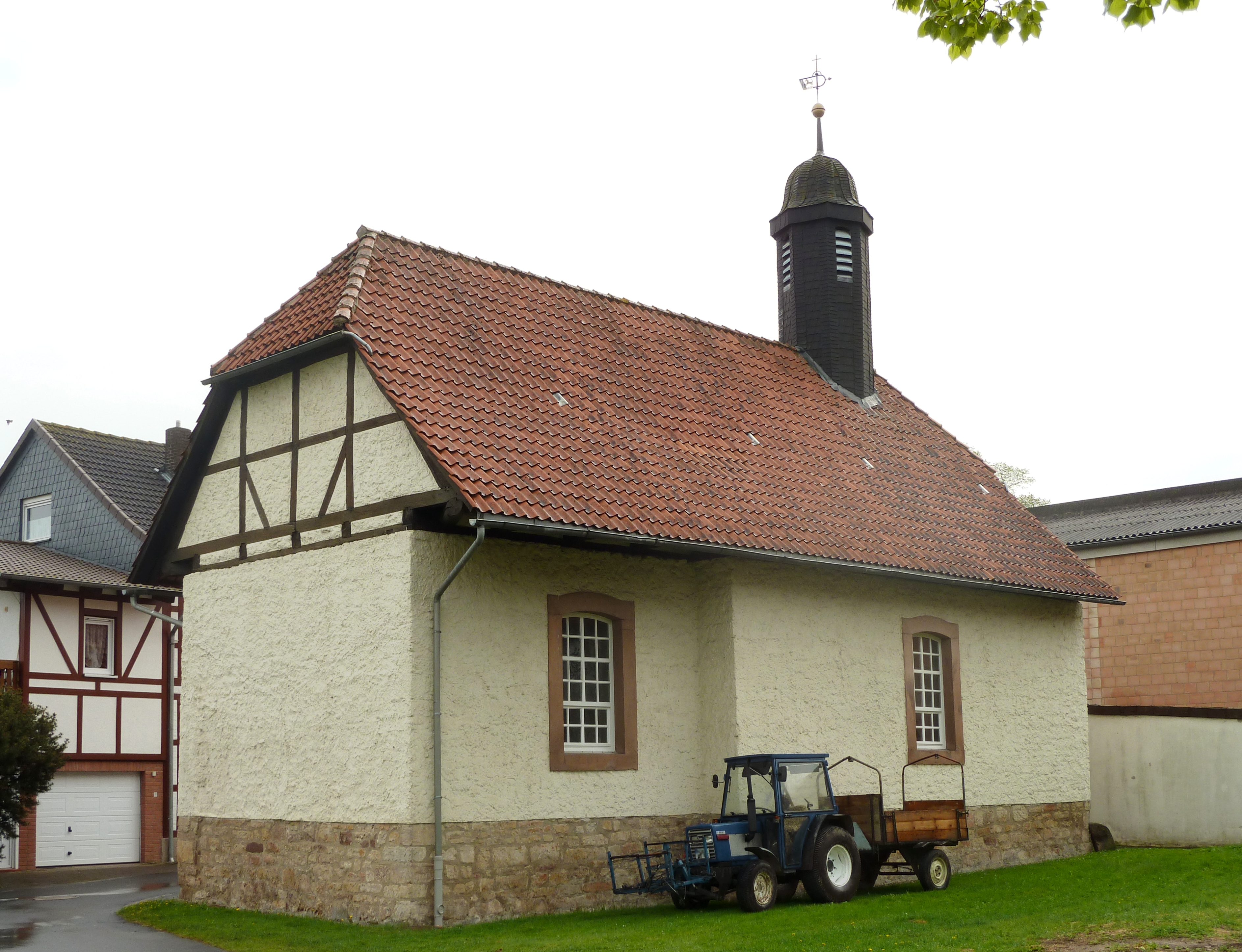 Ev.-luth. Kapelle St. Georg in Lutterbeck, Stadt Moringen, Südniedersachsen. Erbaut 1736